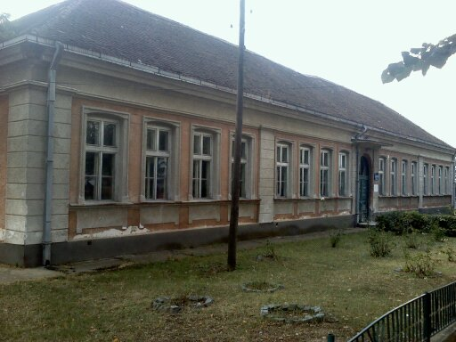 Stara škola u Brzanu, sagrađena 1902. godine, više nije u funkciji.